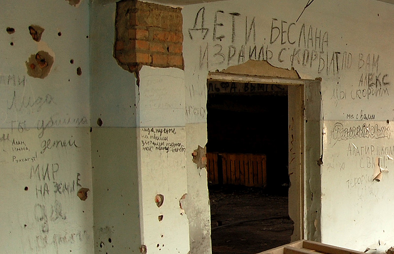 Граффити на стене у входа в актовый зал. Школа № 1 г. Беслана. Июль 2008 года.